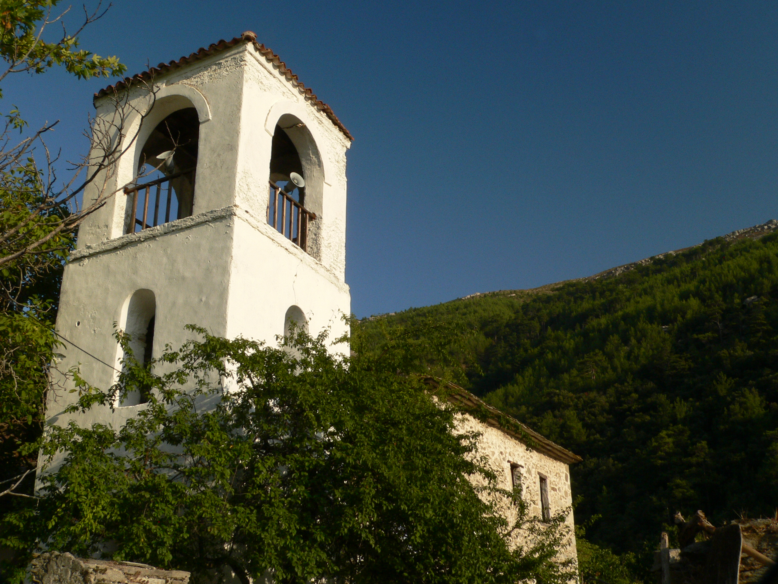 Η εκκλησία του χωριού